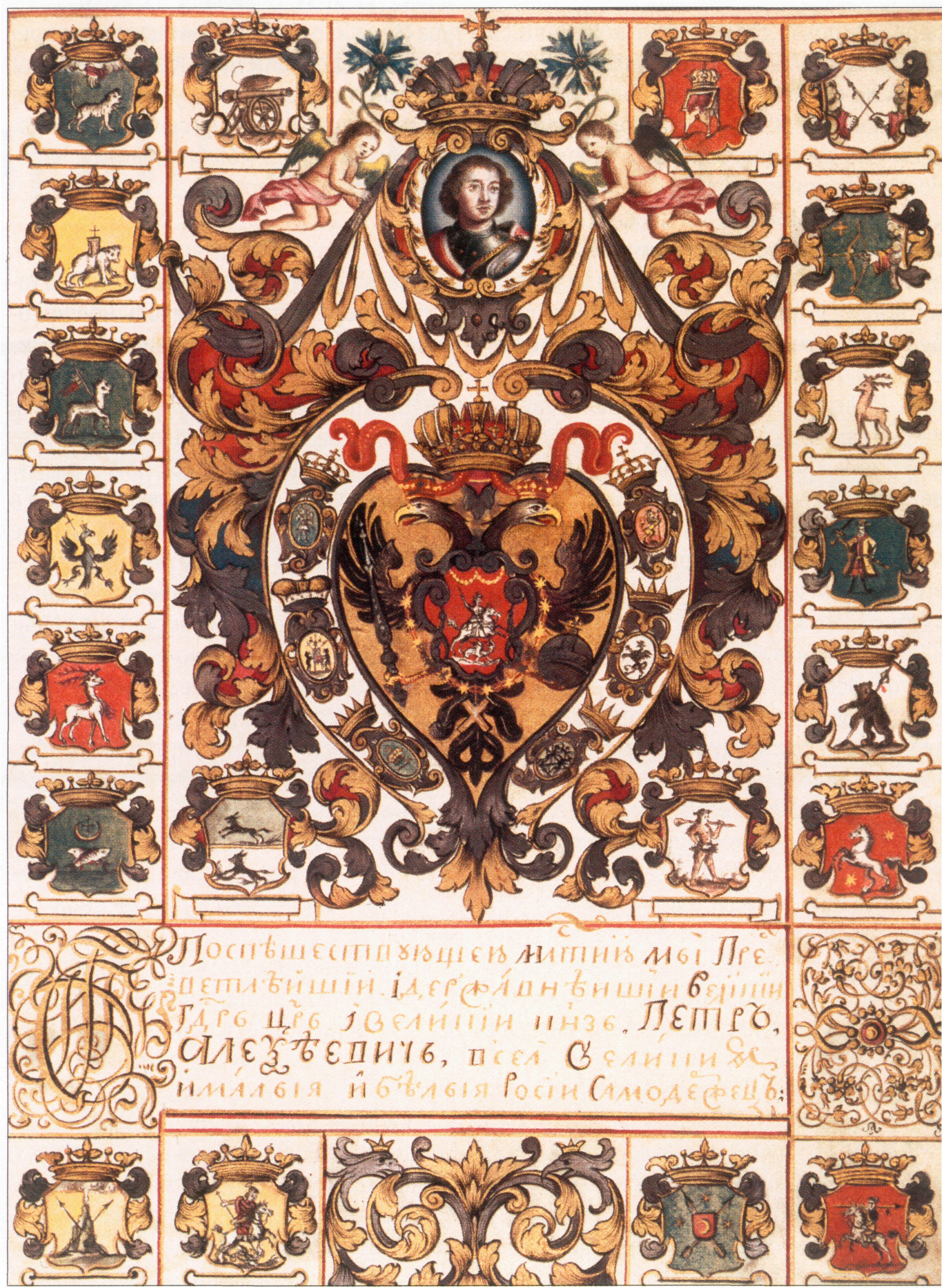 Жалованная грамота Петра Первого канцлеру Г.И. Головкину на вотчину. Титульный лист. Оригинал. 1711 година.